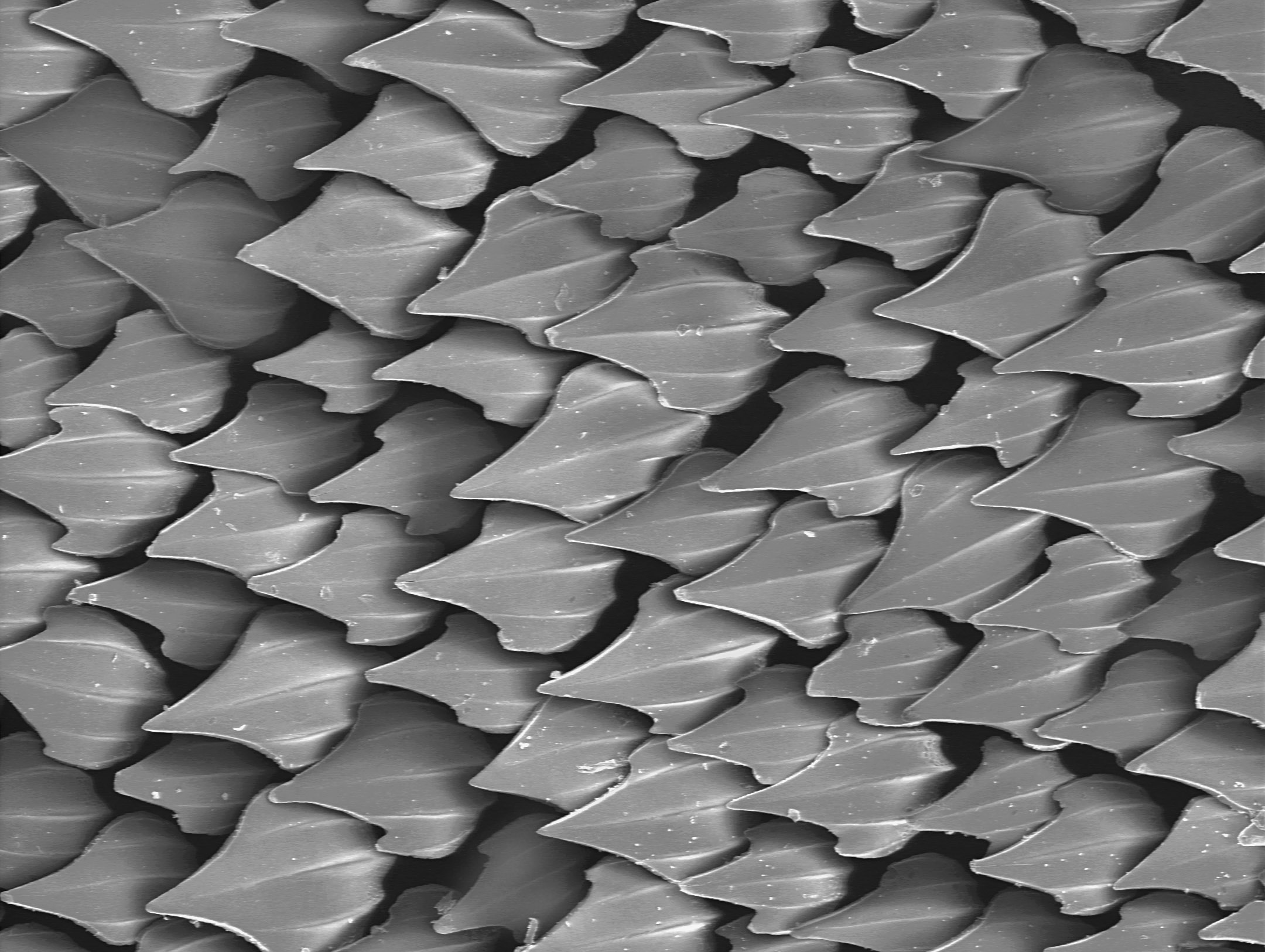 Denticules cutanés montrant la couronne limbée et les carènes